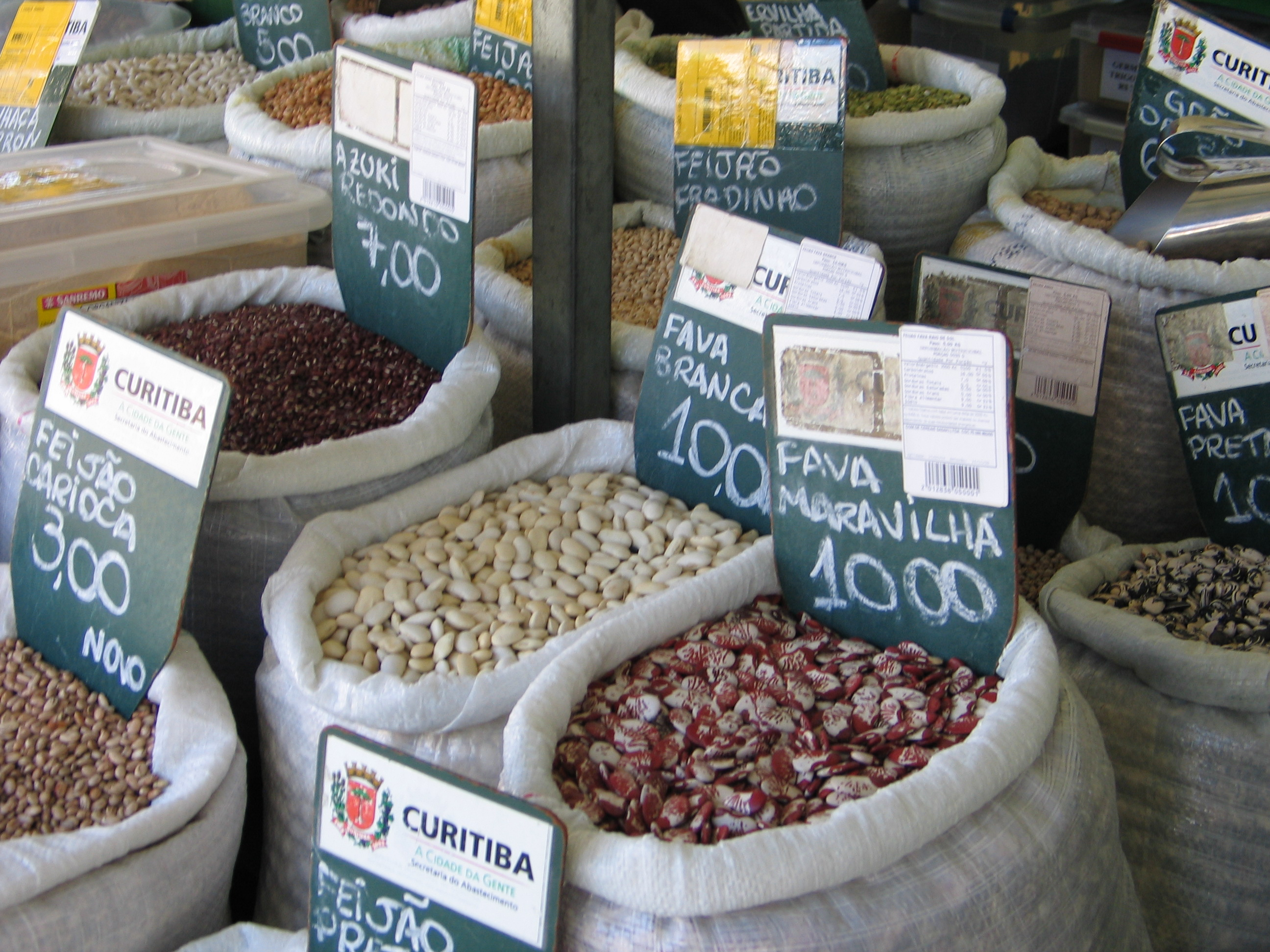 שקי קטניות בשוק